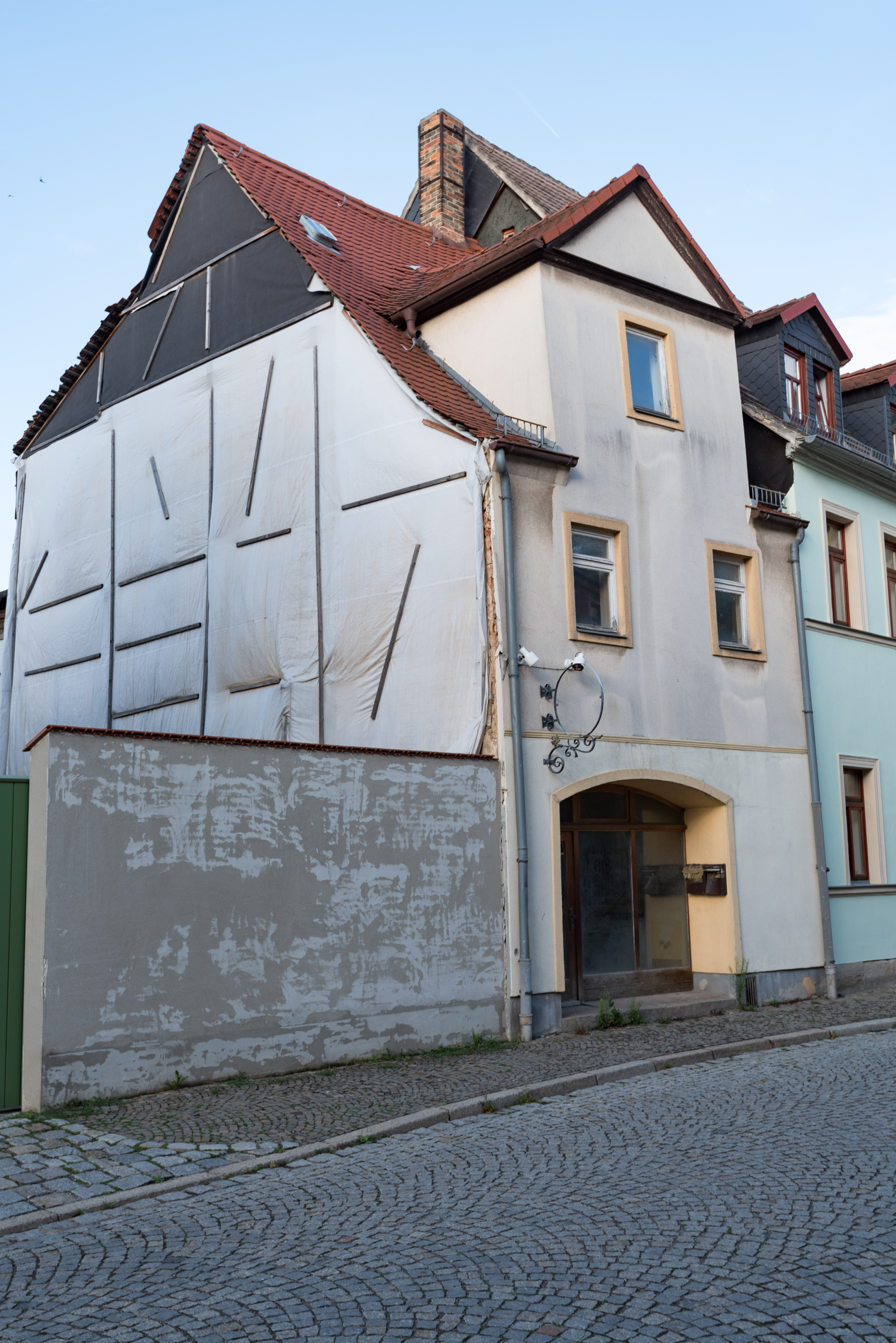 Naumburg (Saale), Wenzelsstraße 25